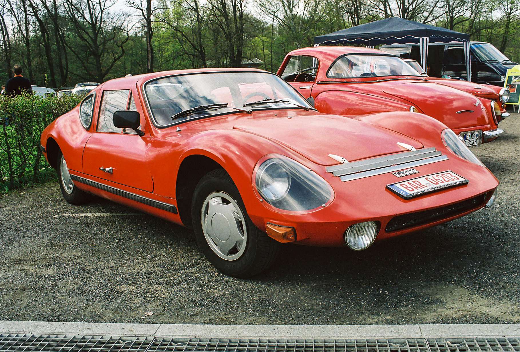 DDR-Sportwagen in Kleinserie: Melkus RS 1000 (technische Basis: Wartburg 353) beim Oldtimertreffen im Familiengarten Eberswalde